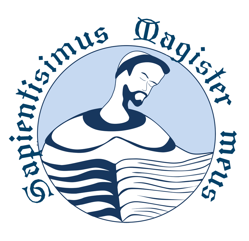 Logo EUM Fray Luis de León